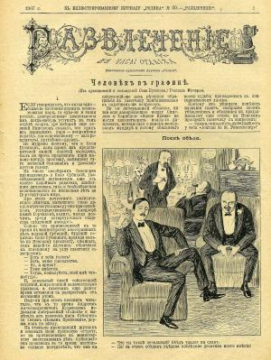 Magazine "Fun", 1907